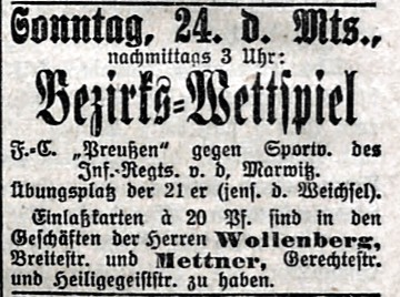 Zapowiedź pierwszego meczu nowego sezonu 1912/1913 pomiędzy SC Preussen Thorn a SV von Marwitz Thorn. Z notki dowiadujemy się także o cenie biletu.